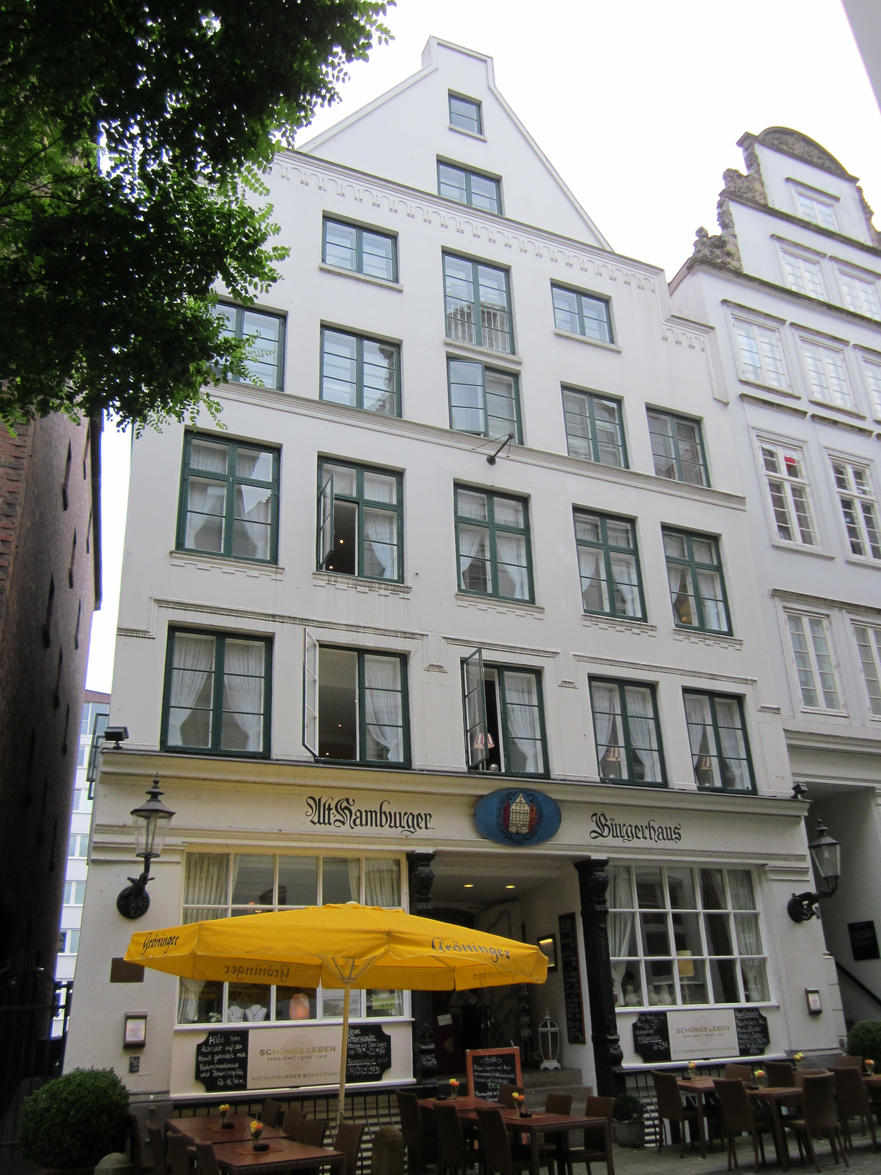 Das Haus Deichstraße 37 in der Hamburger Altstadt wurde 1686 erbaut und 1750 grundlegend umgebaut. Der Verein Rettet die Deichstraße erwarb das Haus und restaurierte es 1976-81, dabei wurde auch die über zwei Geschosse gehende Bürgerhausdiele wieder hergestellt. Das Alt-Hamburger Bürgerhaus genannte Gebäude gehört noch heute dem Verein. Das Mobiliar wird von der Stiftung Alt-Hamburger Bürgerhaus zur Verfügung gestellt.This is a photograph of an architectural monument.